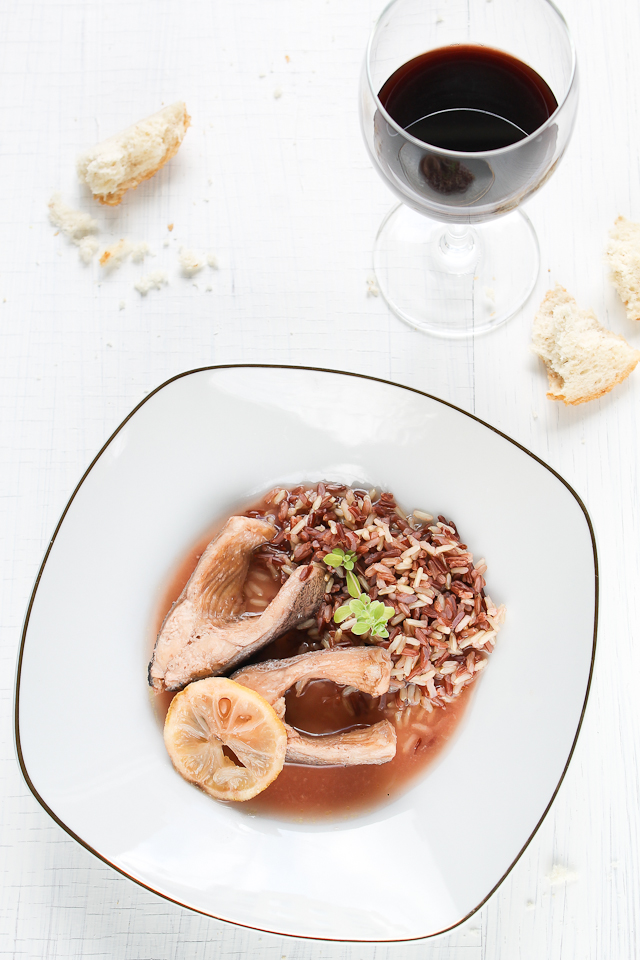 Vivaneau et riz de Camargue accompagné d'un vin rouge IGP Mont-Caume